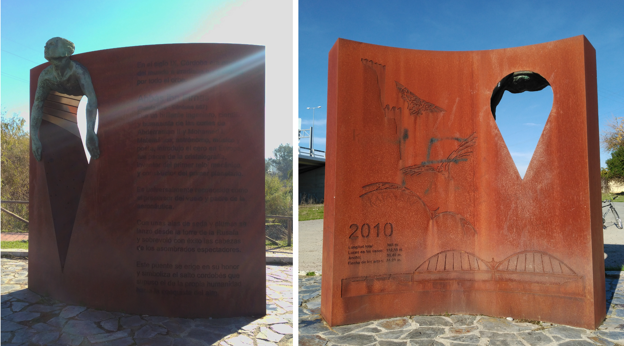 Visión de las dos caras del monumento a Ibn Firnás. Se encuentra situado en el lado este de la orilla norte del puente del mismo nombre, en Córdoba. Es obra de Francisco Javier Galán Domingo del año 2011.